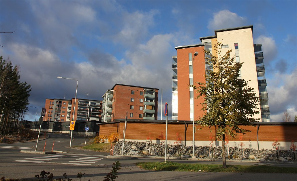 Kerrostaloja Kuopion Lehtoniemen kaupunginosan keskustassa S-marketin ja alakoulun naapurustossa.